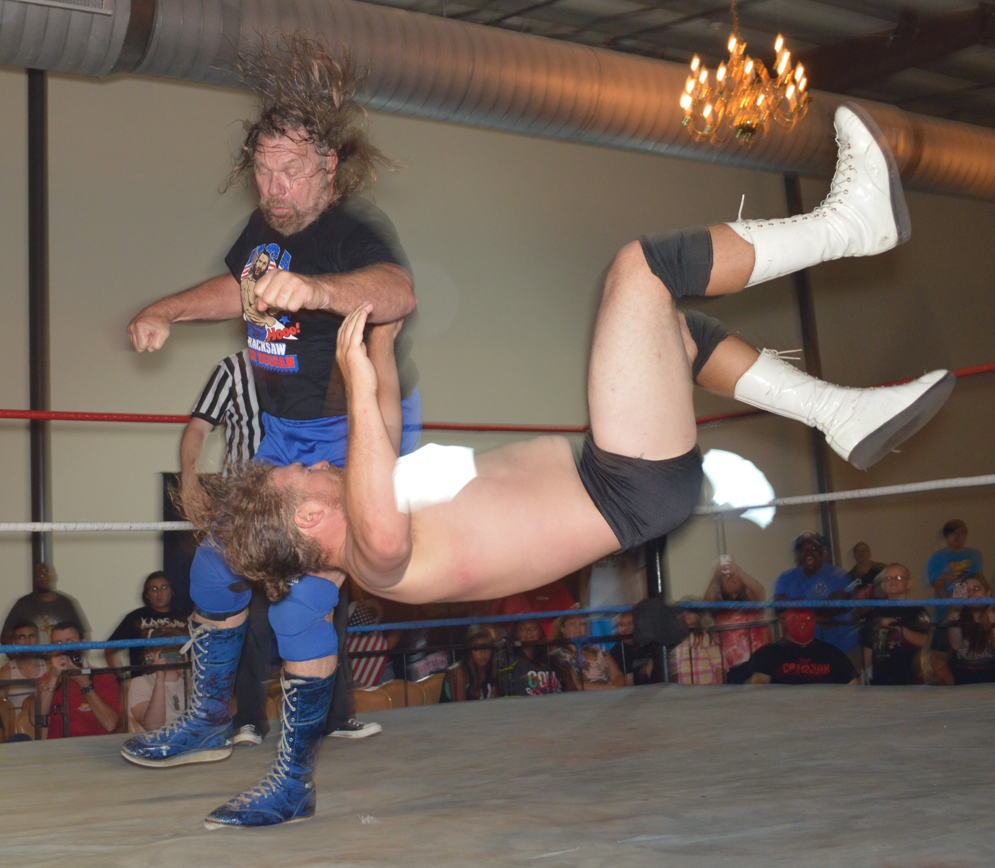 Jim Duggan exécute un Patriot Lariat, sa prise de finition.